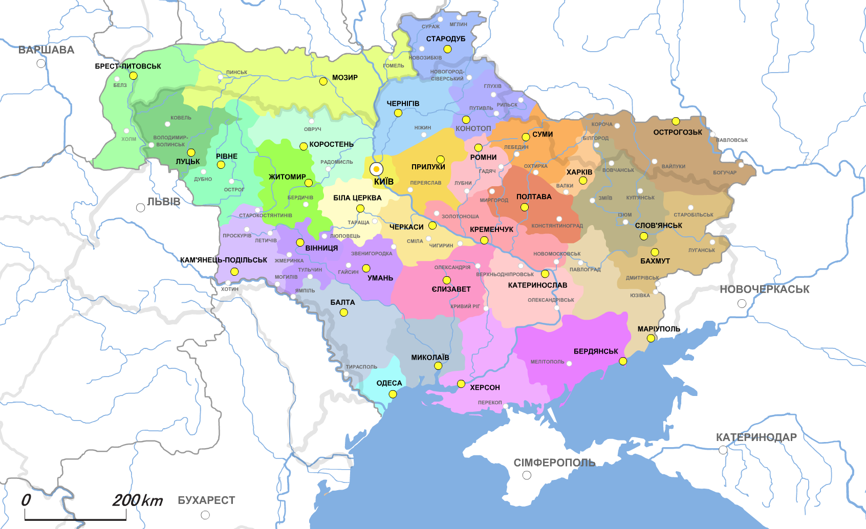 виправлена помилка на ілюстрації статті